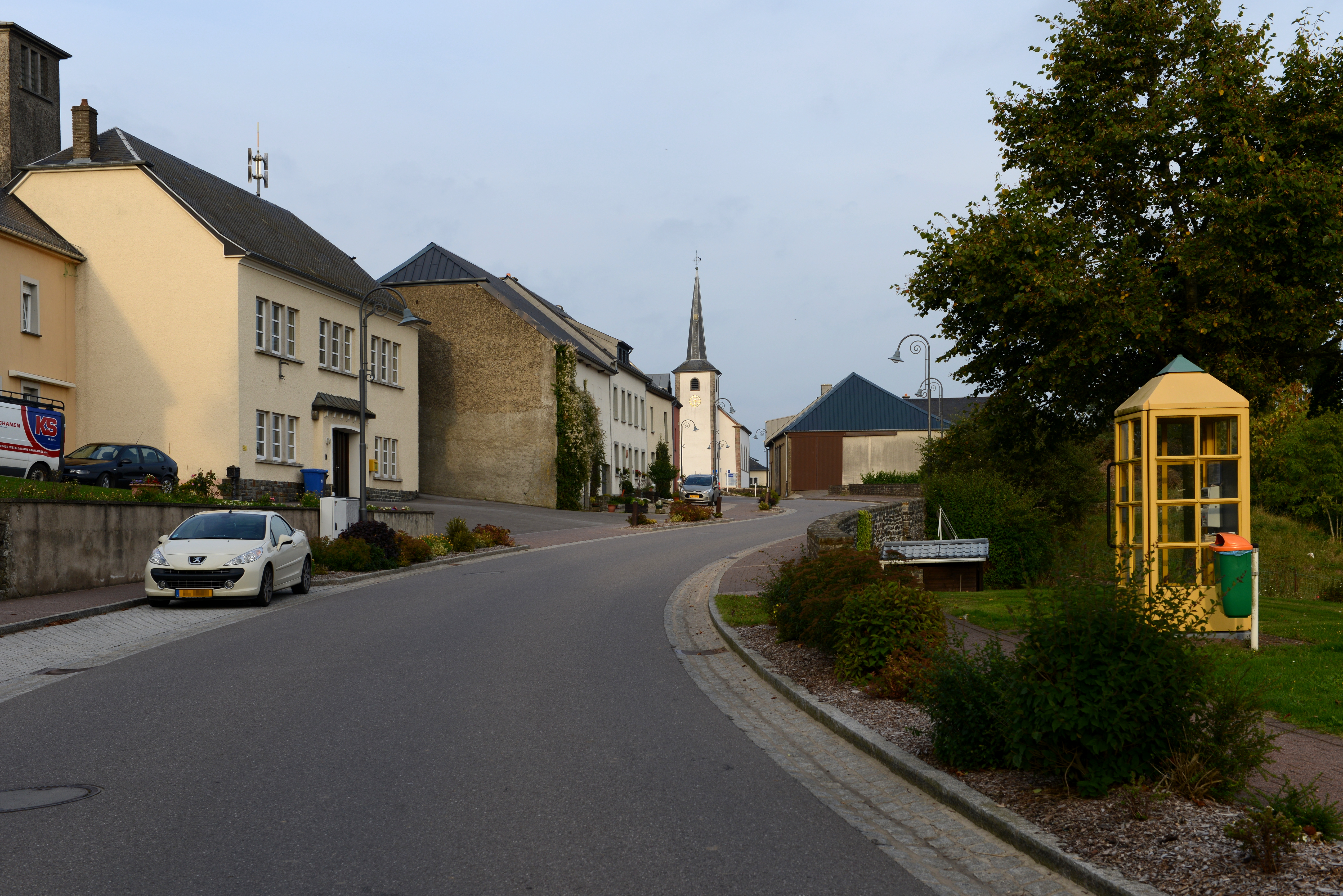 D'Groussgaas zu Buerschent vum Weste gesinn.